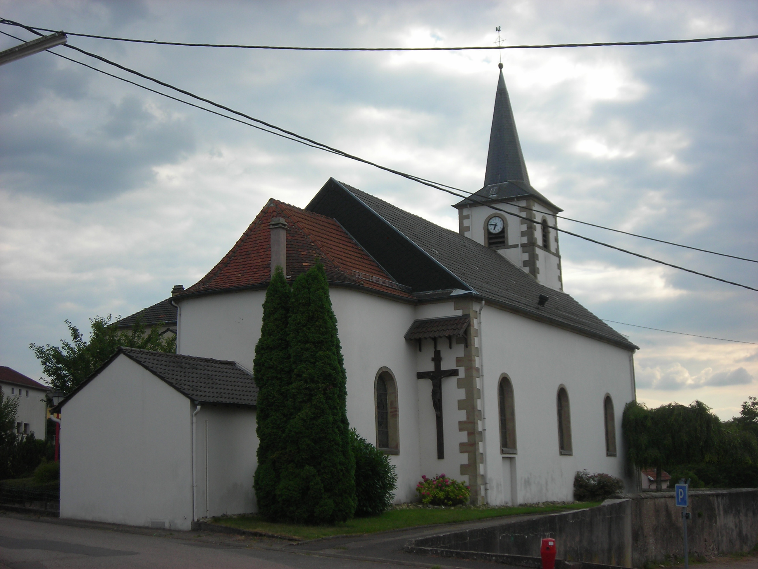 Chevet de l'église St. Fiacre de Berviller-en-Moselle (France)